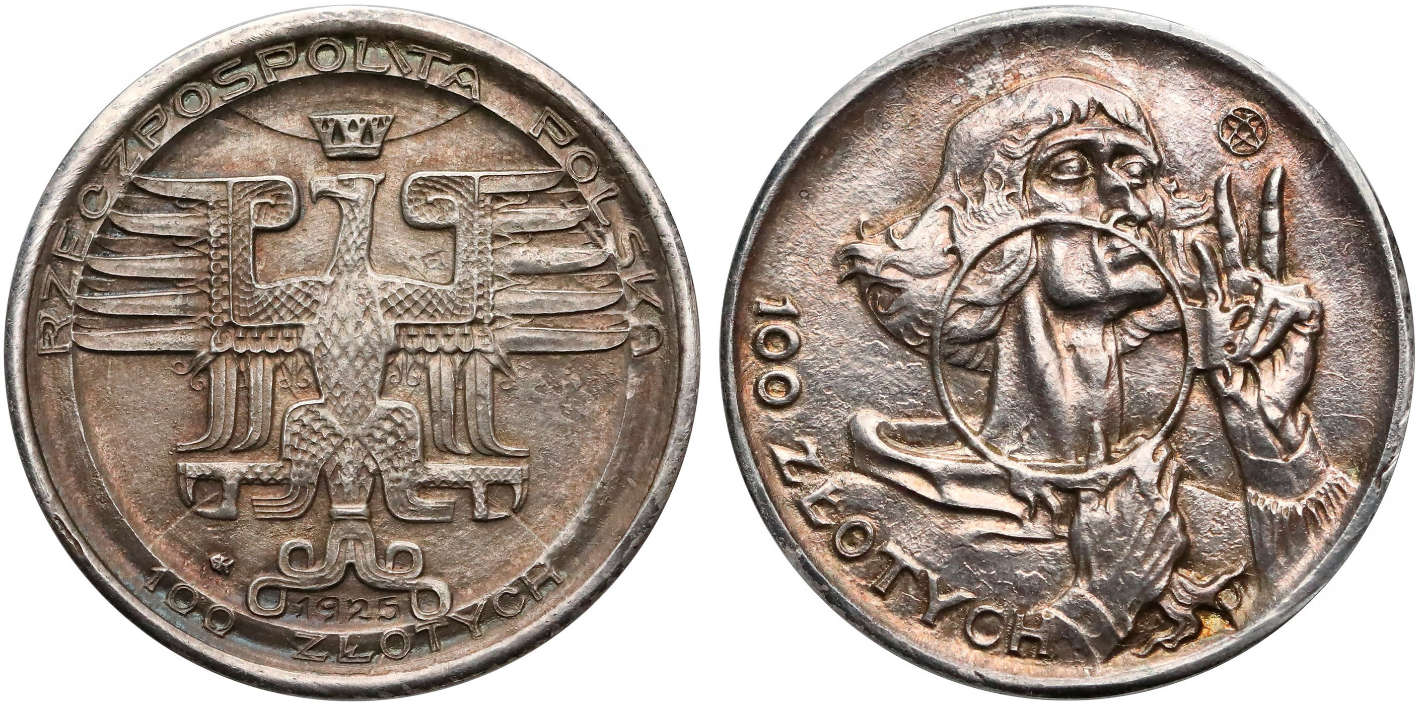 PRÓBA 100 złotych 1925 Mikołaj Kopernik 20.5 mm srebro